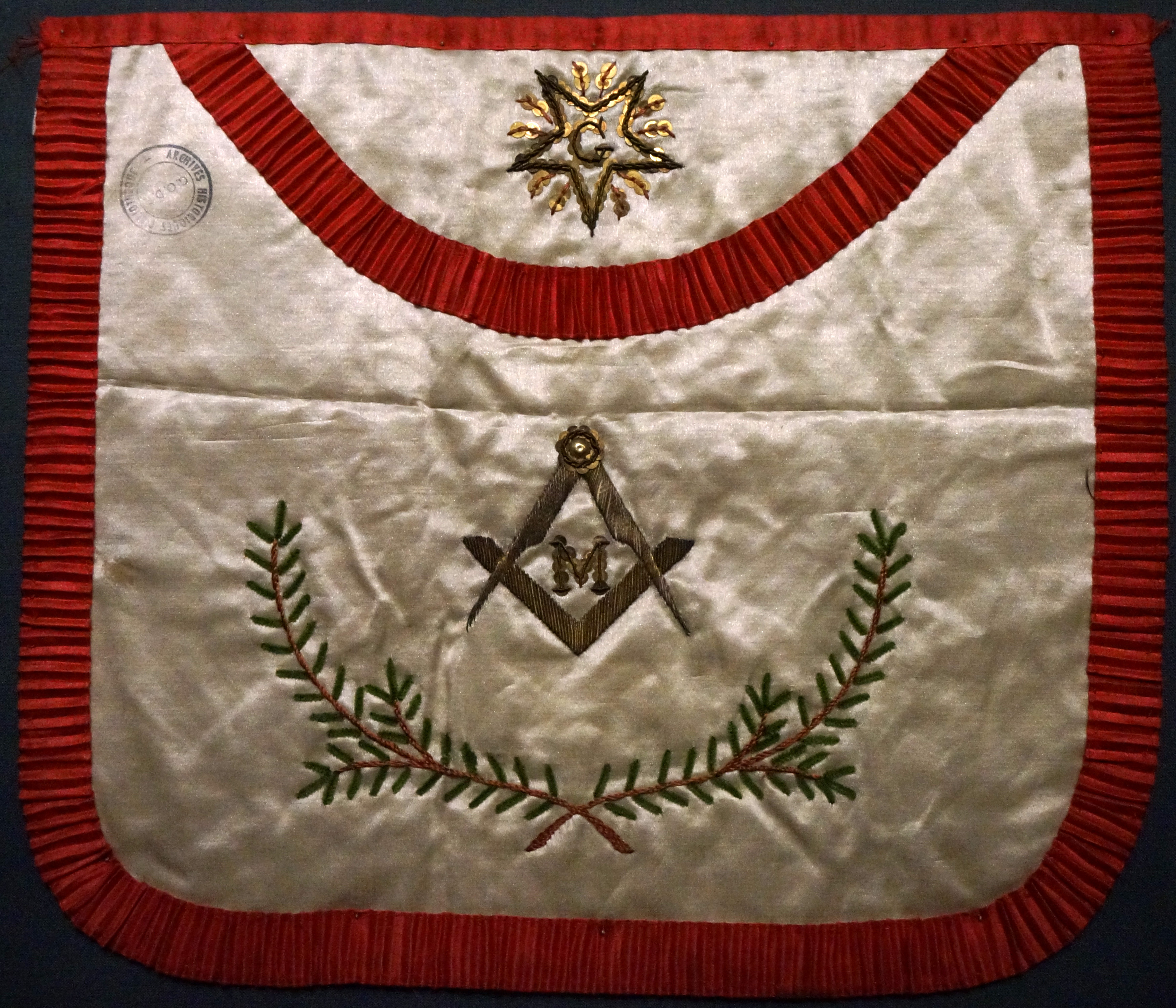 présenté au Musée de la Franc-Maçonnerie.